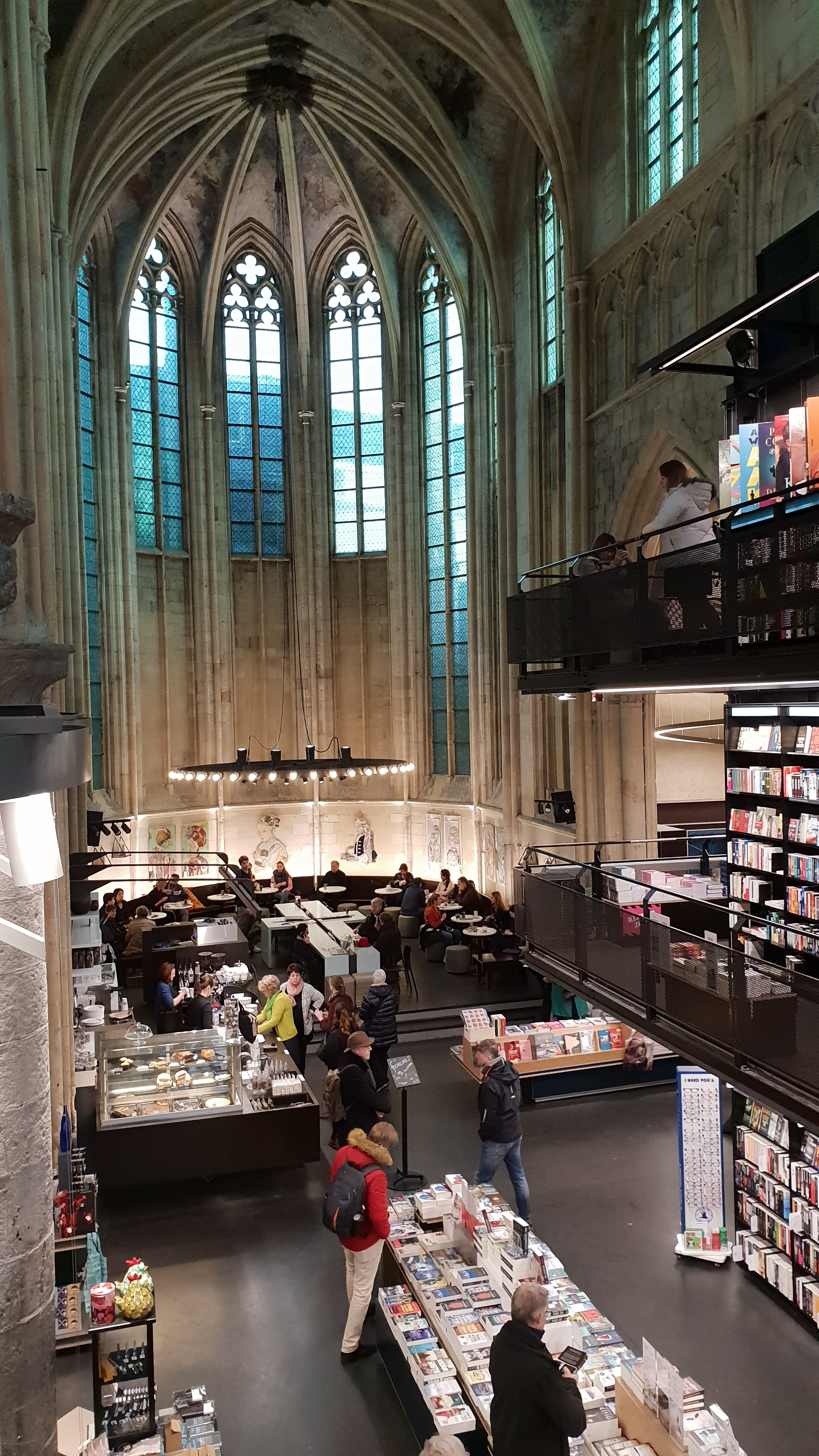 L'intérieur de l'église des Dominicains, reconvertie en librairie (Maastricht, Pays-Bas)